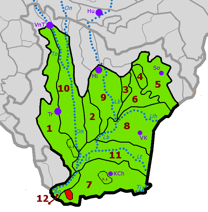 Poloha geomorfologické části Tarbucka (červeně) v rámci členění geomorfologického celku Východoslovenská rovina (zeleně). Schematicky jsou znázorněny též nejvýznamnější vodní toky a města. Východoslovenská rovina Trebišovská tabuľa Veľký vrch Malčická tabuľa Iňačovská tabuľa Závadská tabuľa Sobranecká rovina Senianska mokraď Medzibodrocké pláňavy Chlmecké pahorky Tarbucka Kapušianske pláňavy Laborecká rovina Ondavská rovina Latorická rovina Bodrocká rovina řeky / rivers Bo – Bodrog Lb – Laborec Lt – Latorica On – Ondava Ti – Tisa To – Topľa Uh – Uh města / towns Hu Humenné KCh – Kráľovský Chlmec Mi – Michalovce So – Sobrance Tr – Trebišov VnT – Vranov nad Topľou VK – Veľké Kapušany